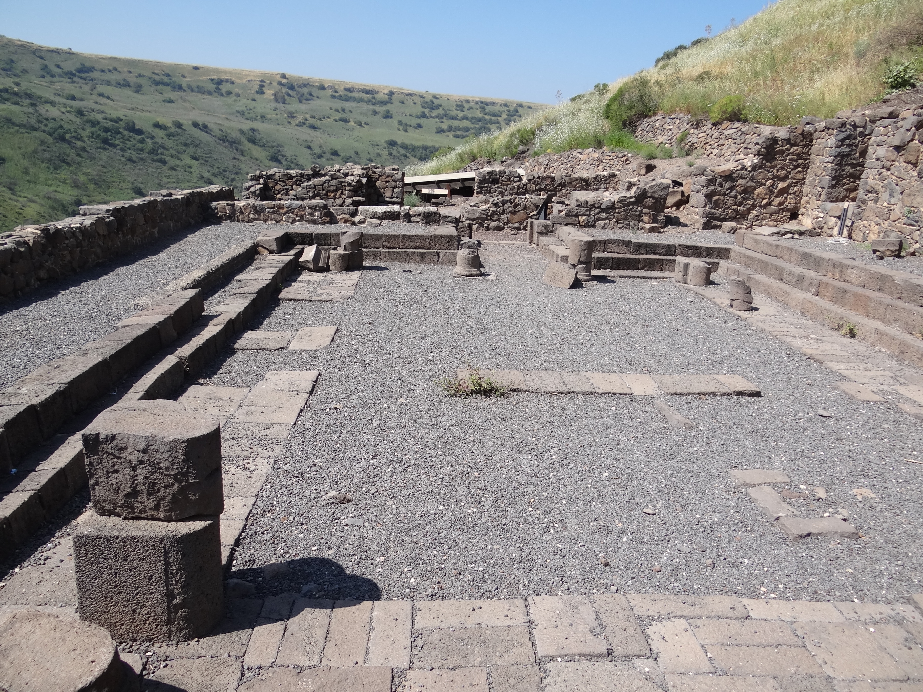 Gamla Synagogue in Golan Heightsת Built during the second Temple Period in the first century CE. This is the one of the most ancient synagogues in Israel בית הכנסת בגמלא, שמקורו כנראה בתקופה ההרודיאנית. זהו ממצא ייחודי שכן היה זה בית הכנסת הראשון מהתקופה ההרודיאנית .